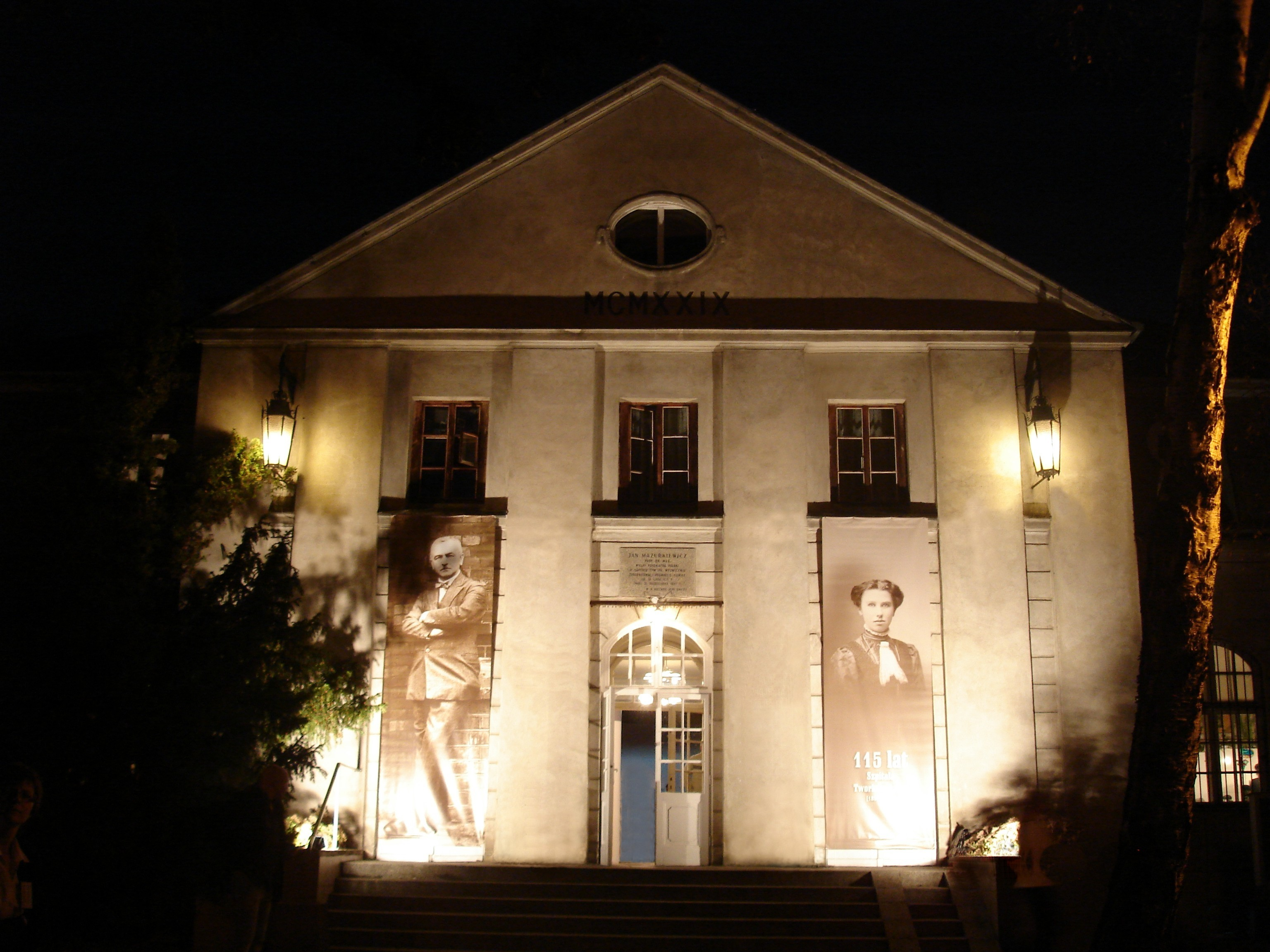 Pałacyk nad Utratą powstał w 1929r. Jest zabytkowym kinoteatrem, zaprojektowanym przez Tadeusza Plucińskiego w stylu narodowym. Obecnie mieści się w nim Centrum Środowiskowe Szpitala im.Prof. Jana Mazurkiewicza, odbywają się zajęcia terapeutyczne, edukacyjne i okolicznościowe uroczystości.